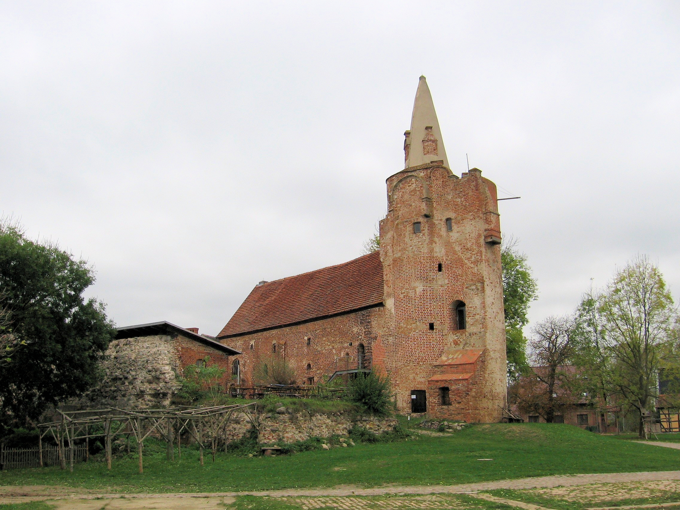 Burg Klempenow von Südosten